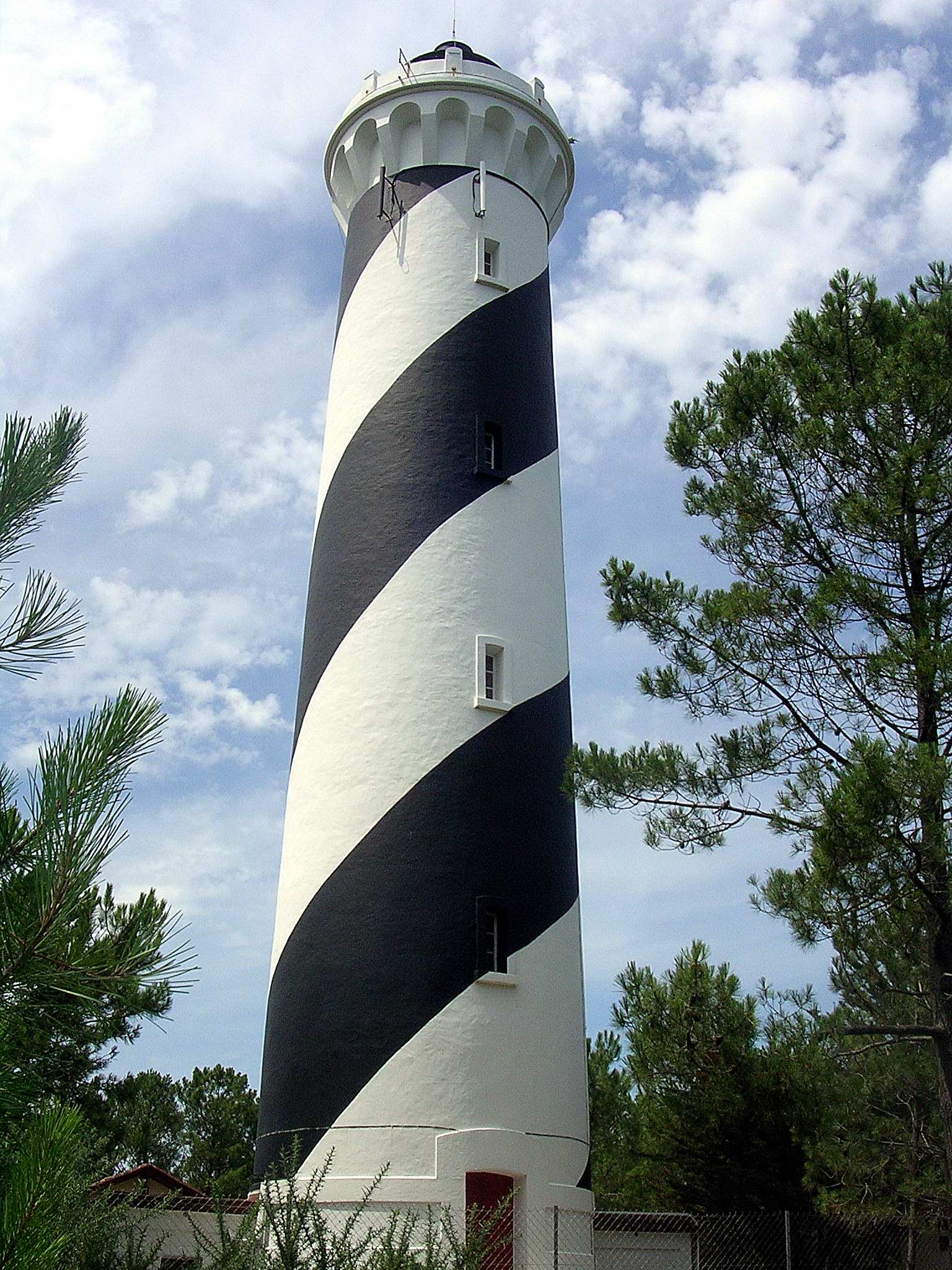 Phare de Contis, dans le département français des Landes